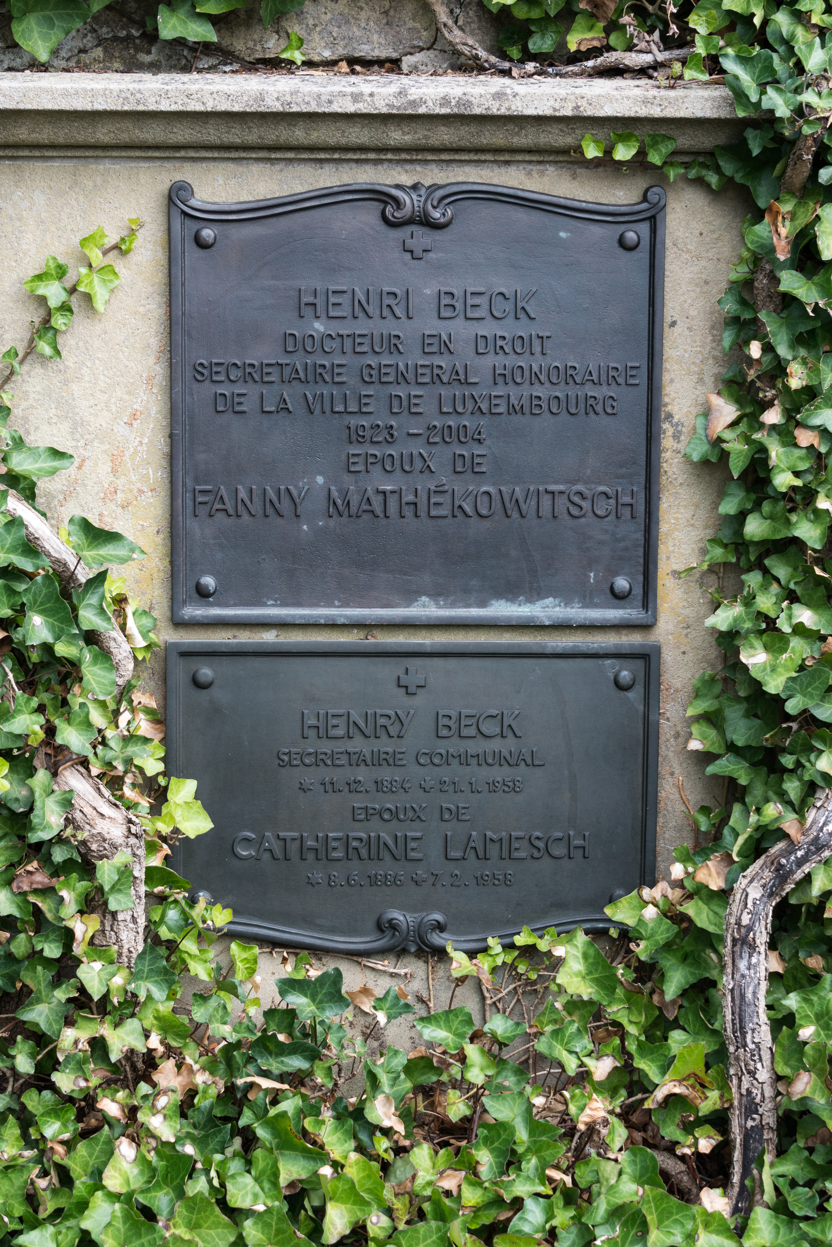 Familljegraf Henry an Henri Beck um Nikloskierfecht.